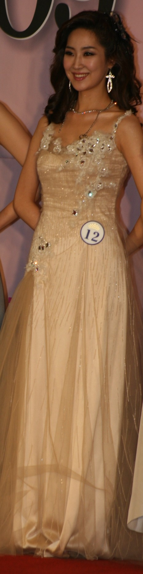 2009 미스코리아 서울 드레스 심사